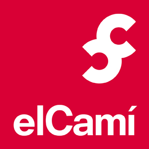 Logo del Camí